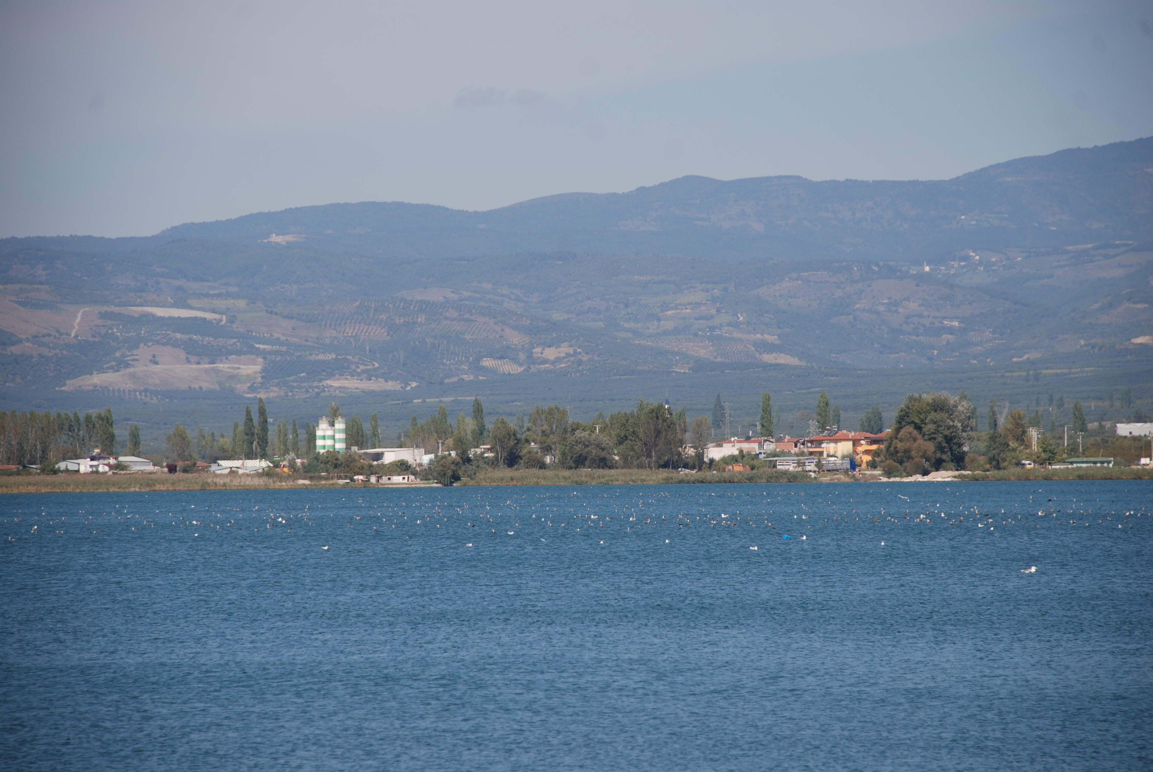 İznik gölü, kuşlar ve piknik alanları